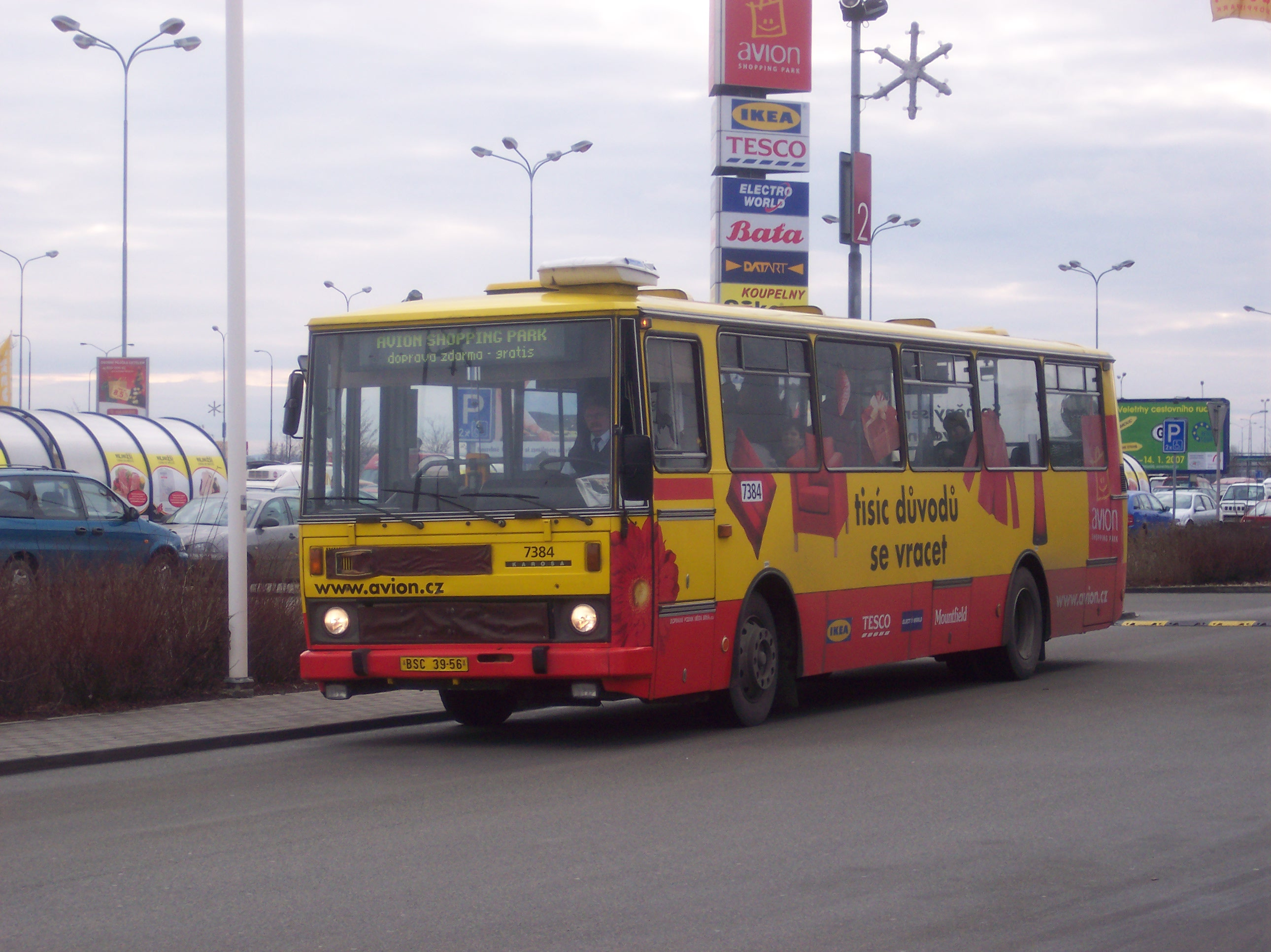 Autobus co jezdí do Avion Schopping park v Brně(doprava zdarma)